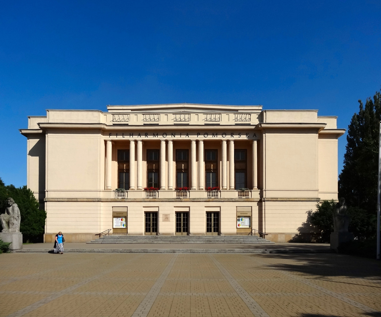 Budynek Filharmonii Pomorskiej im.Ignacego Jana Paderewskiego w Bydgoszczy zbud.w 1955 r.